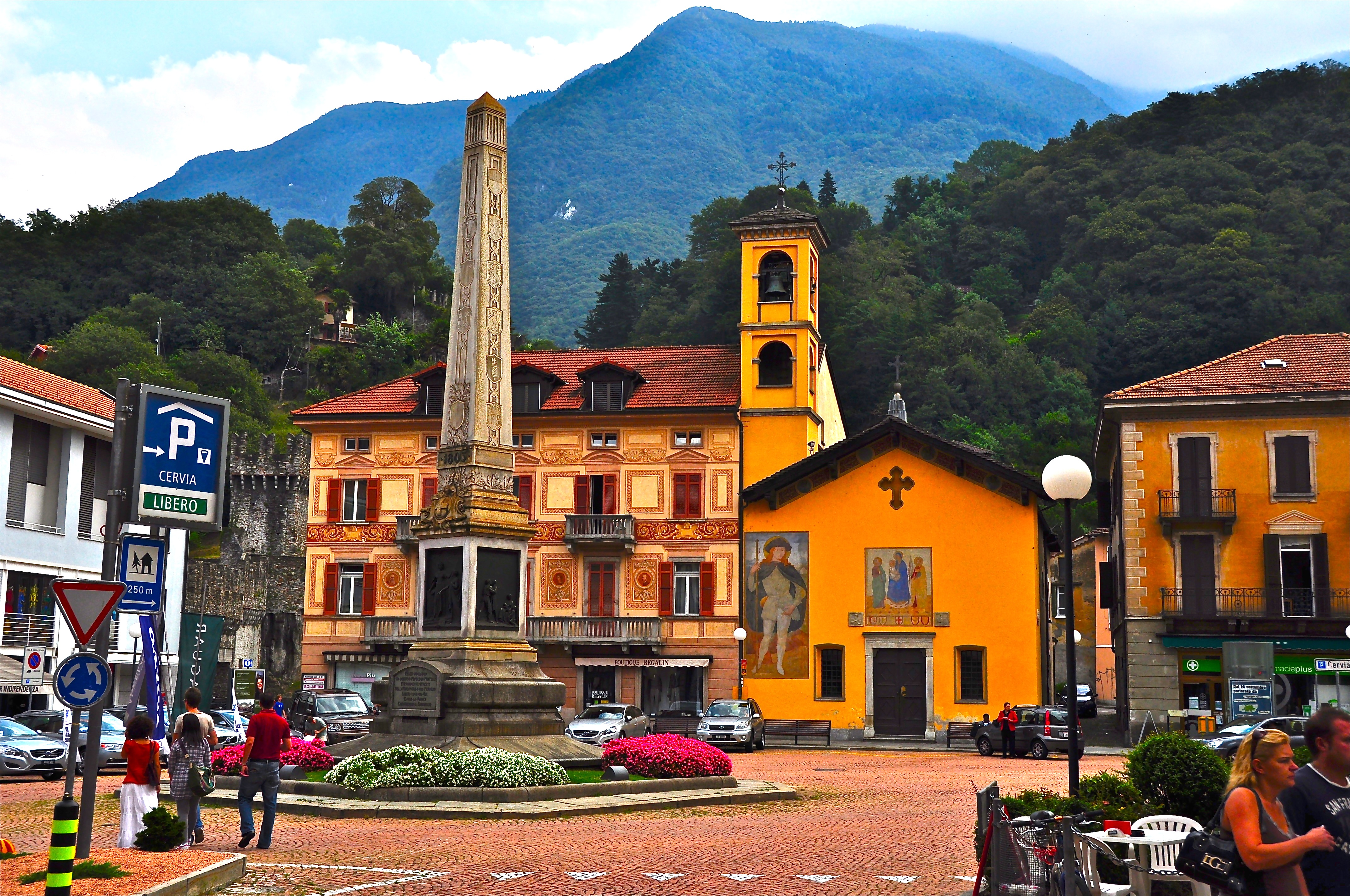 Piazza Indipendenza. Chiesa di San Rocco Sec. XVI-XVII.